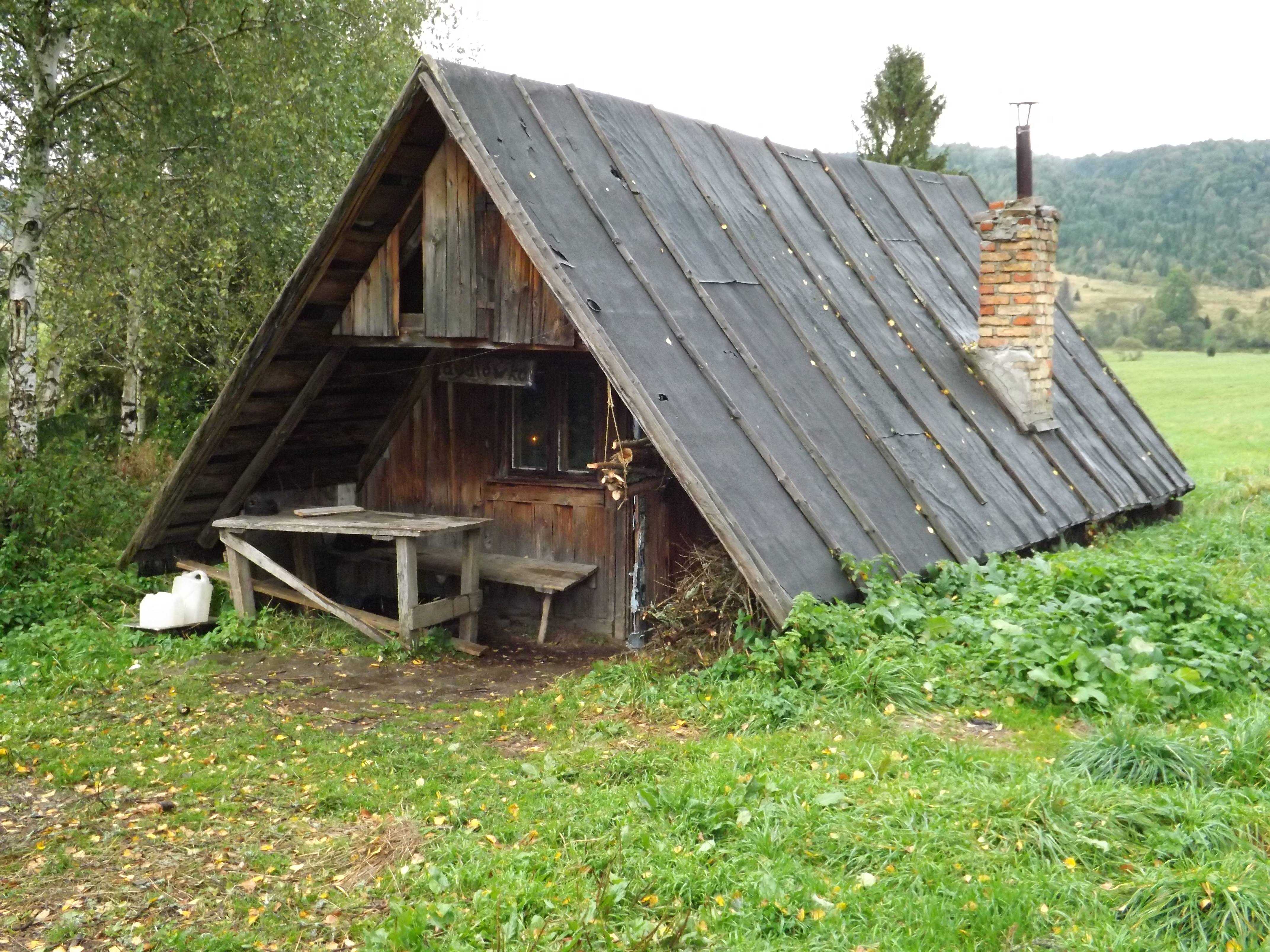 Dydiówka